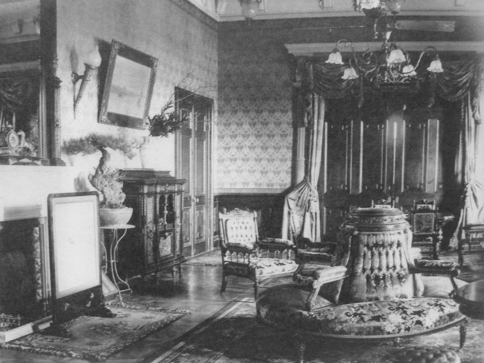 臺灣總督官邸一樓會客室未改建前的樣子。